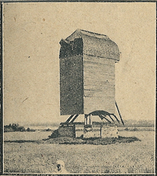 Luciemøllen i København. En af de mange møller der stod på volden omkring København, i dette tilfælde Vestervold. Den blev efter voldenes sløjfning flyttet til Kongens Enghave. Her blev den brugt af hjemløse som overnatningssted indtil Skt. Hans Aften 1914 hvor nogle personer besluttede at lave et Skt. Hans bål ved at antænde den. Den nedbrændte til grunden.